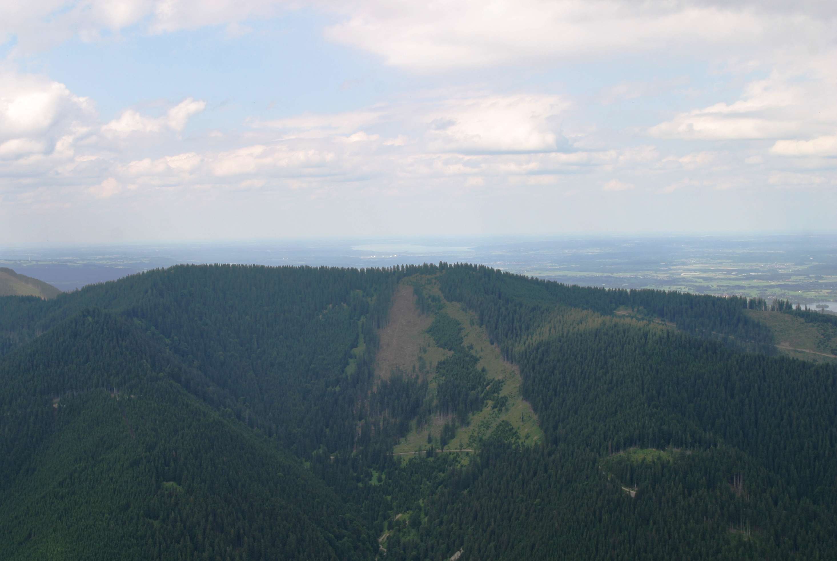 Südansicht des Aufackers, aufgenommen auf dem Laber